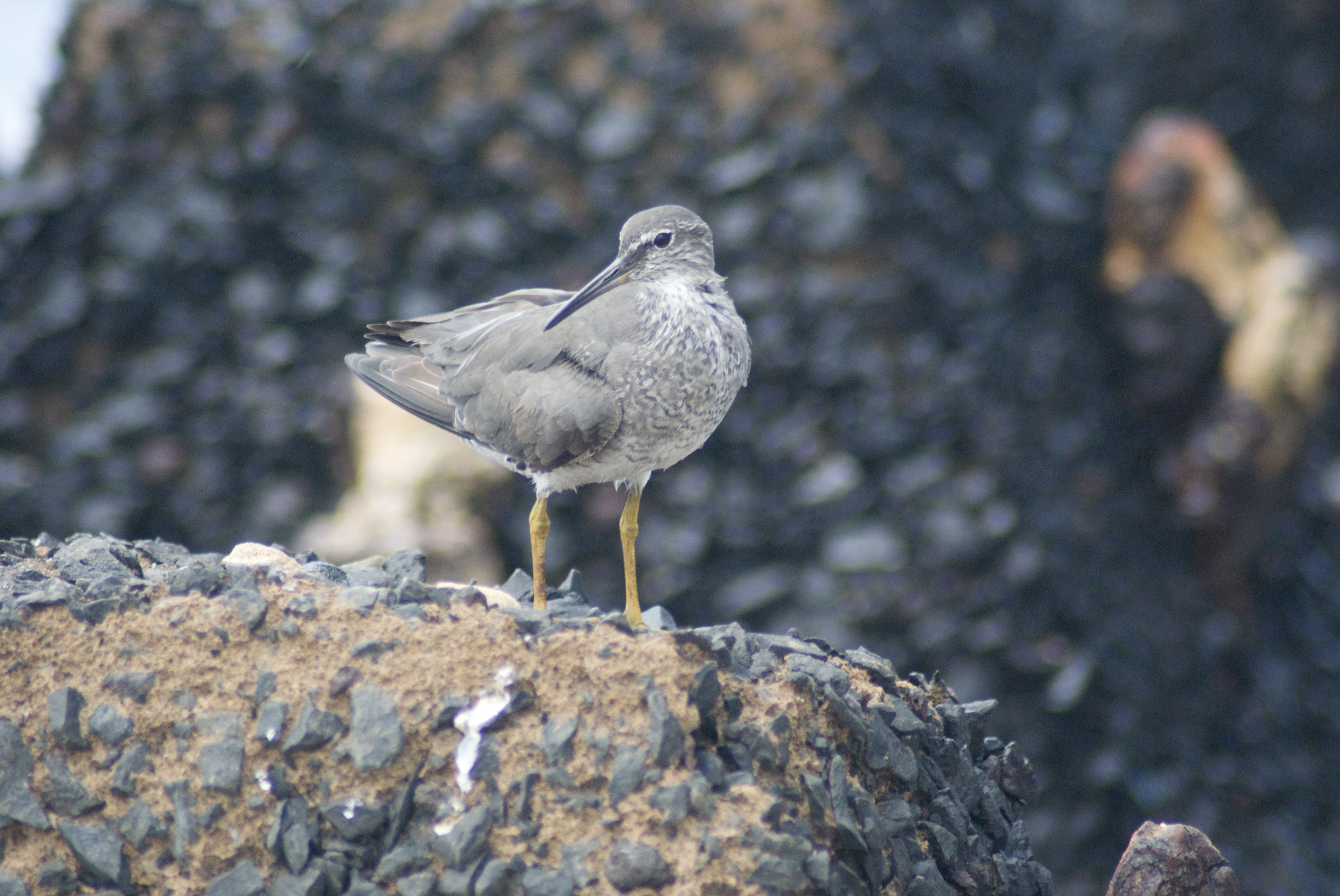 Wandering Tattler Tringa incana, Kihei, Hawaii, USA